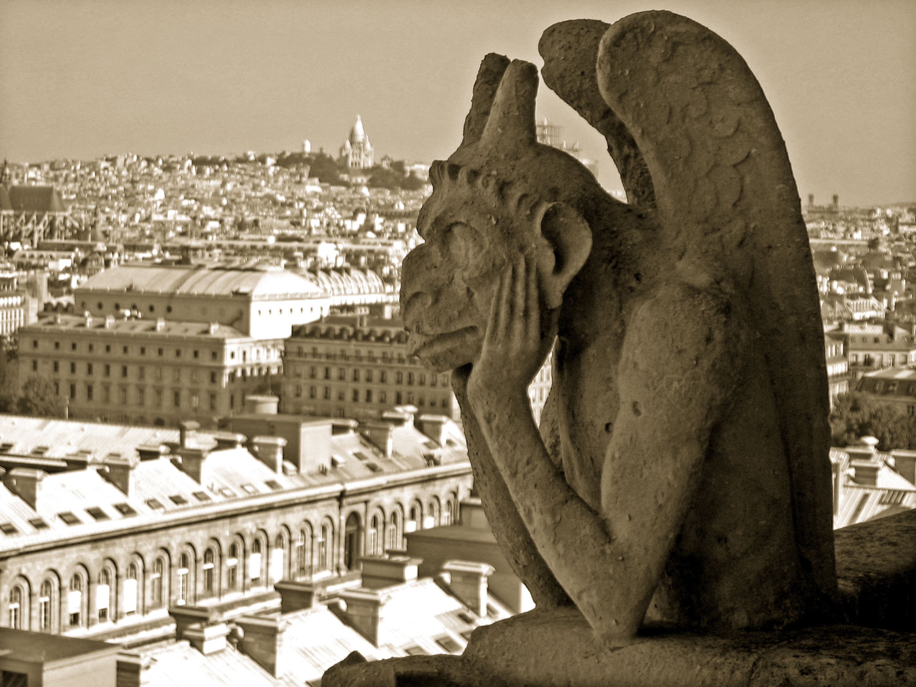 Galerie des Chimères, Notre-Dame Foto de Chosovi